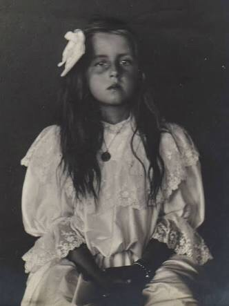 Português do Brasil: Uma garotinha em uma foto pós-morte (?)